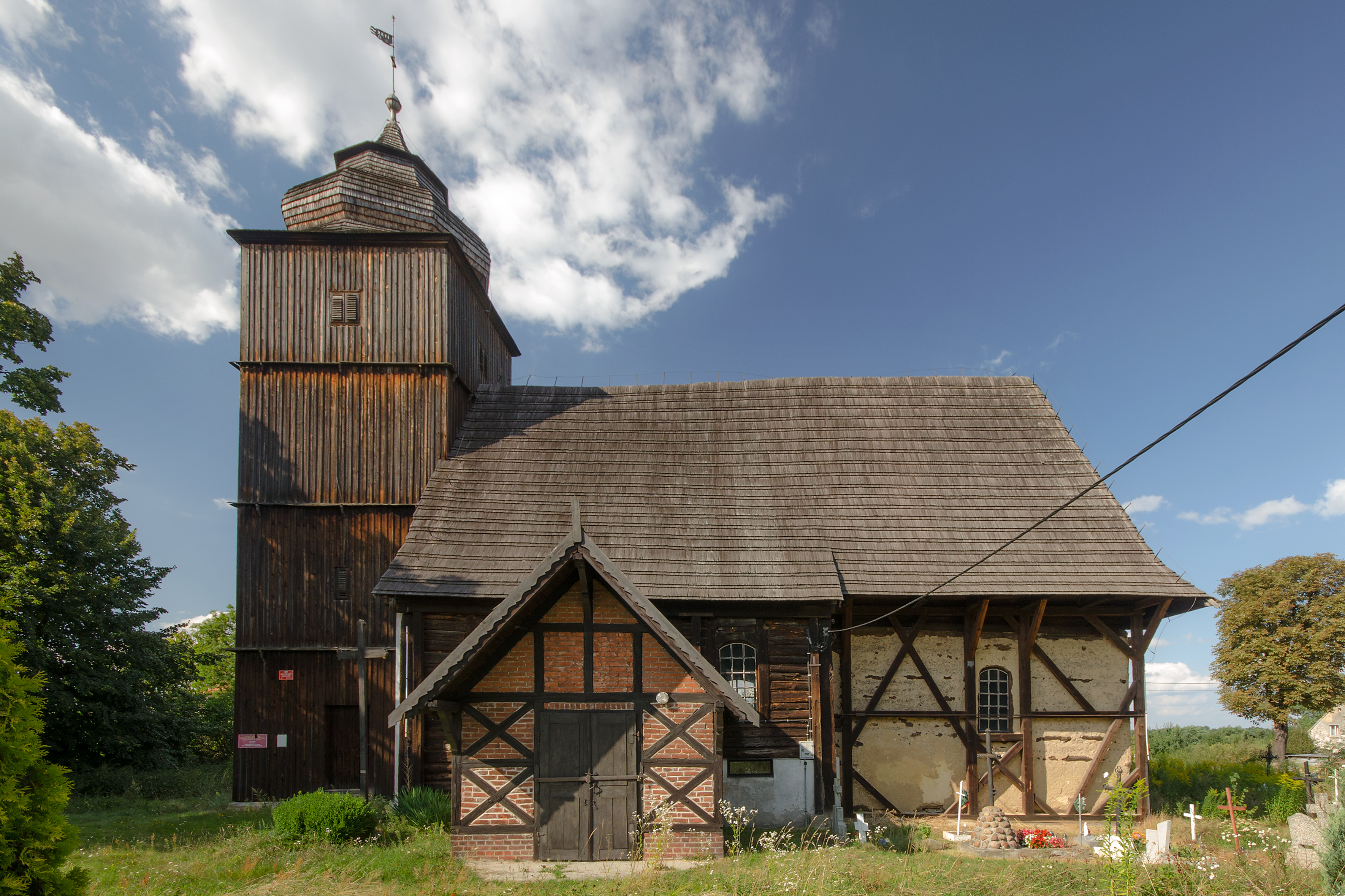 Obórki, kościół ewangelicki, ob. kościół polsko-kat. p.w. śś. Piotra i Pawła, XVII, 1755